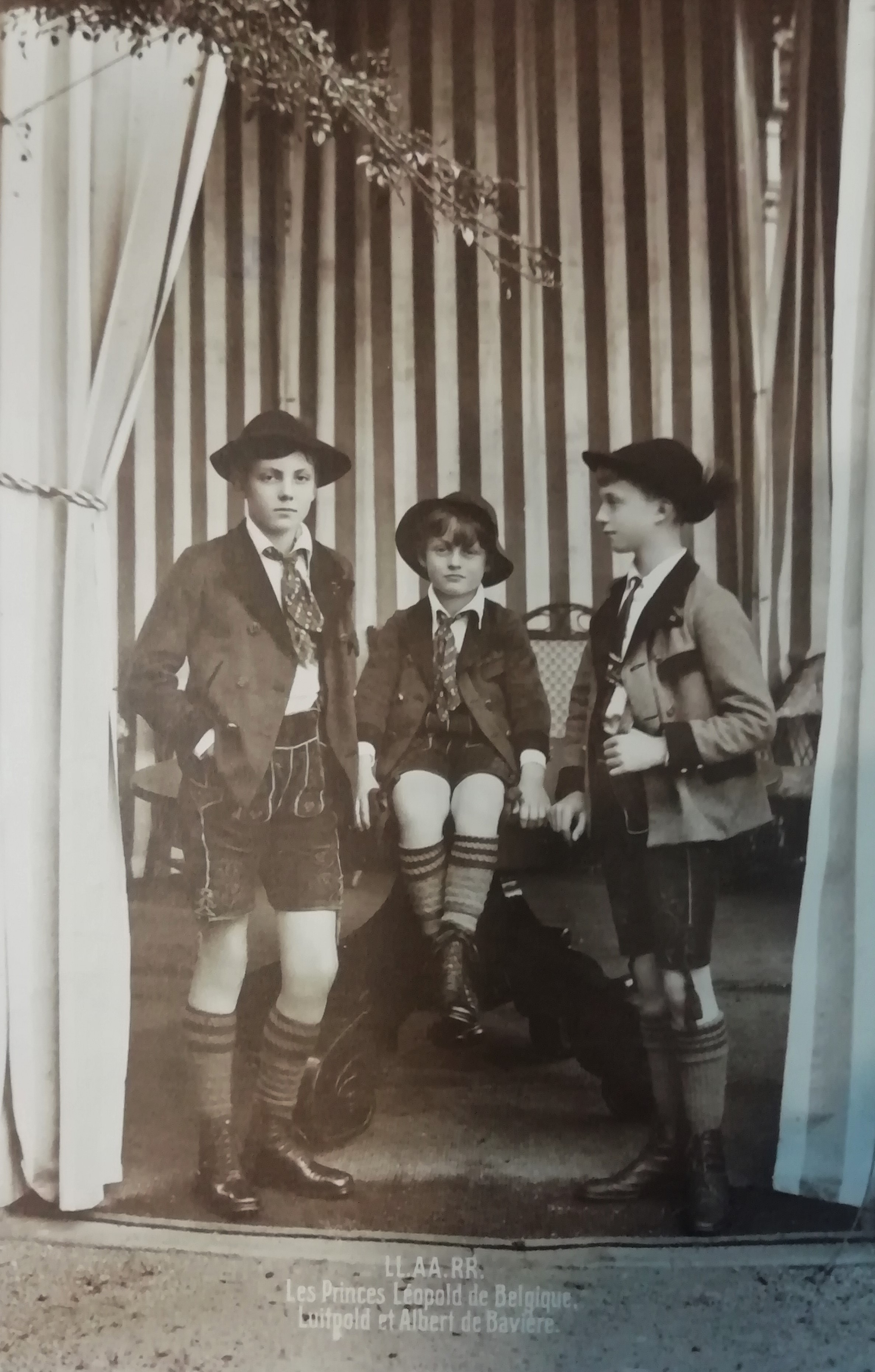 Luitpold et Albrecht de Bavière avec Léopold (III) de Belgique en 1913